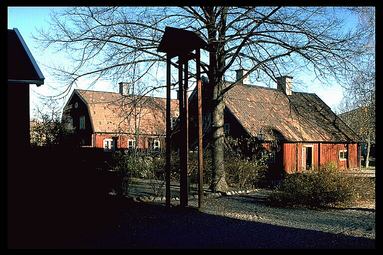 Bilden troligen från slutet av 1970-talet. Motiv: Rademachersmedjorna Nyckelord: Byggnadsminnen, Riksintressen Kategori: Smedja, Bruksmiljö Bilden troligen från slutet av 1970-talet.